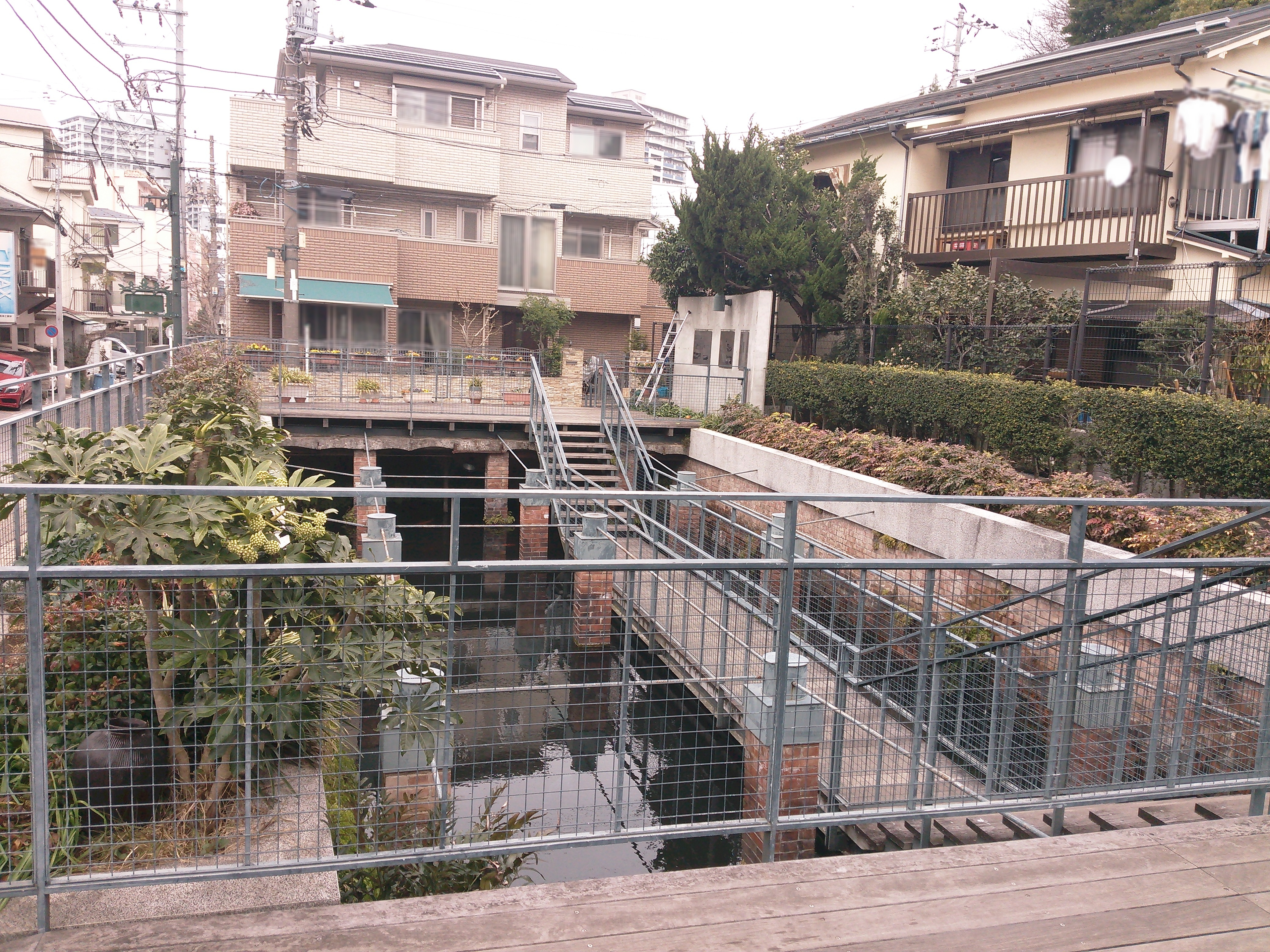 アルフレッド・ジェラールが1860年代後半に造ったとみられる貯水槽。登録有形文化財。